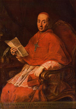 Ritratto di Banditi Francesco Maria (1706-1796)